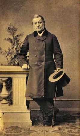 Christian Schøller (1804-1888)